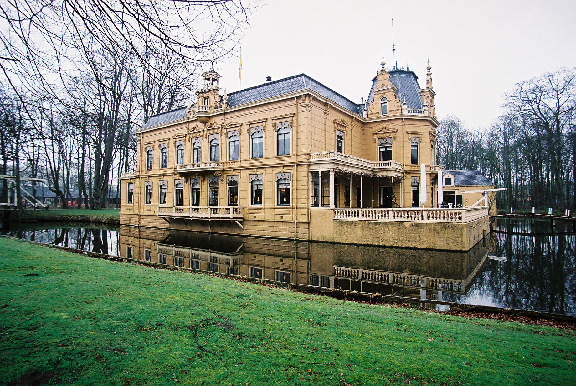 Borg Nienoord te Leek.